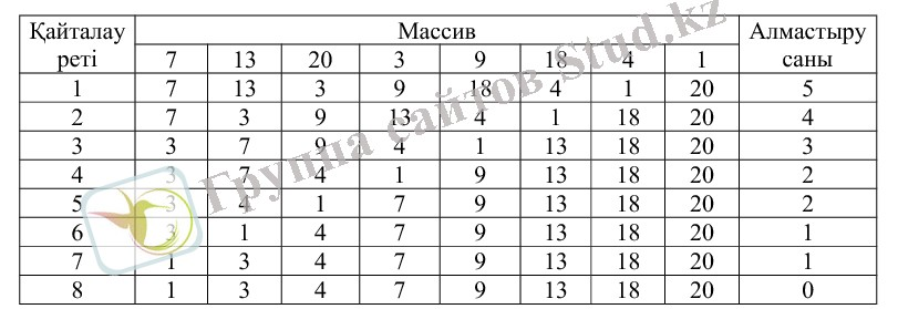 Қазақша (кирил): Алмастыру арқылы сұрыптау